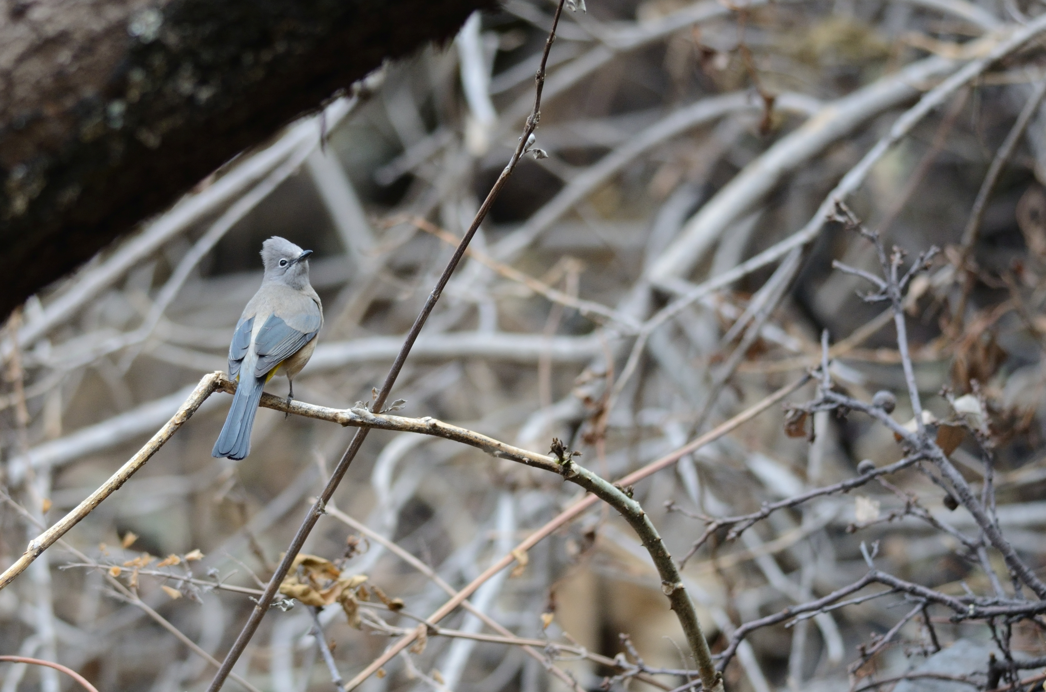 Ptilogonys cinereus